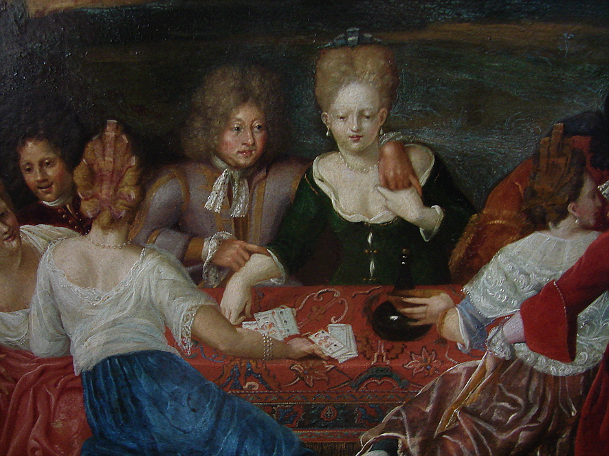 detail